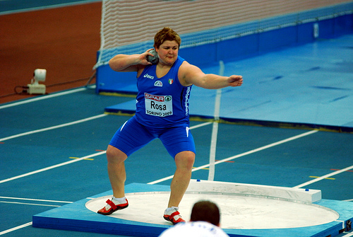 l'atleta italiana Chiara Rosa durante la fase di rotazione del getto del peso